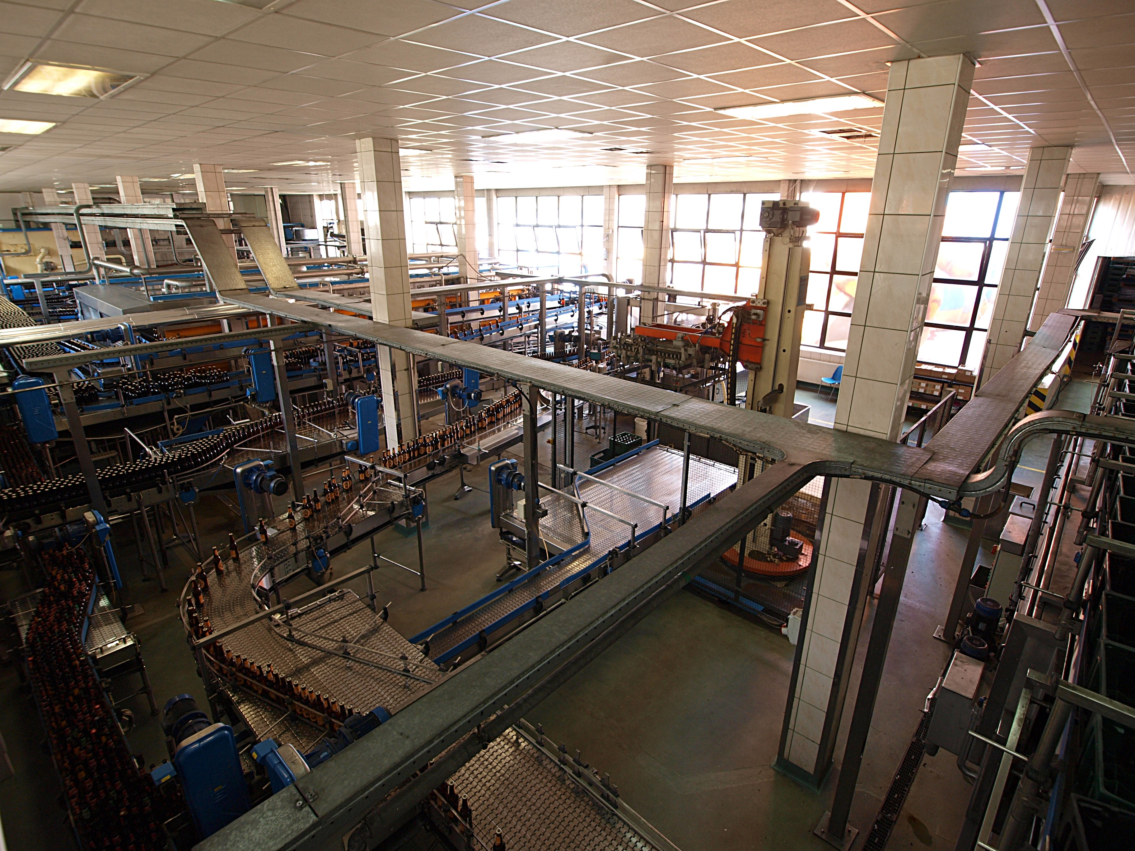 Browary Górnośląskie w Zabrzu. Rozlewnia piwa butelkowego.